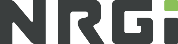 NRGi´s